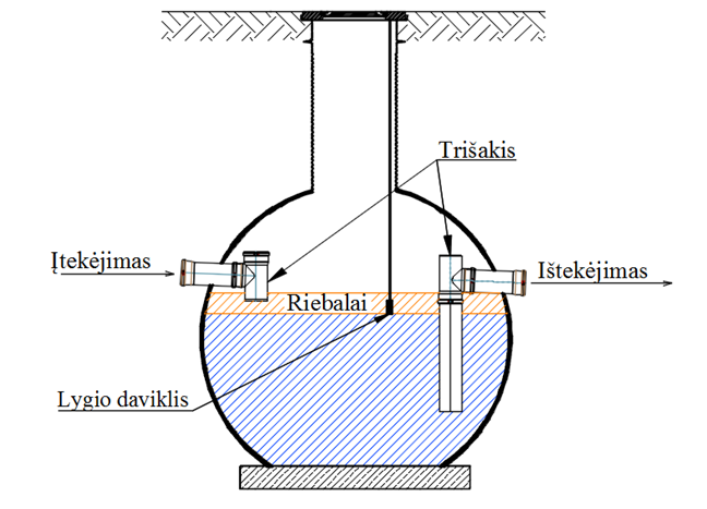 Principinė riebalų gaudyklės schema